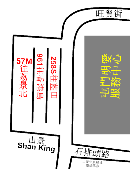 中文（香港）: 山景巴士總站的平面圖